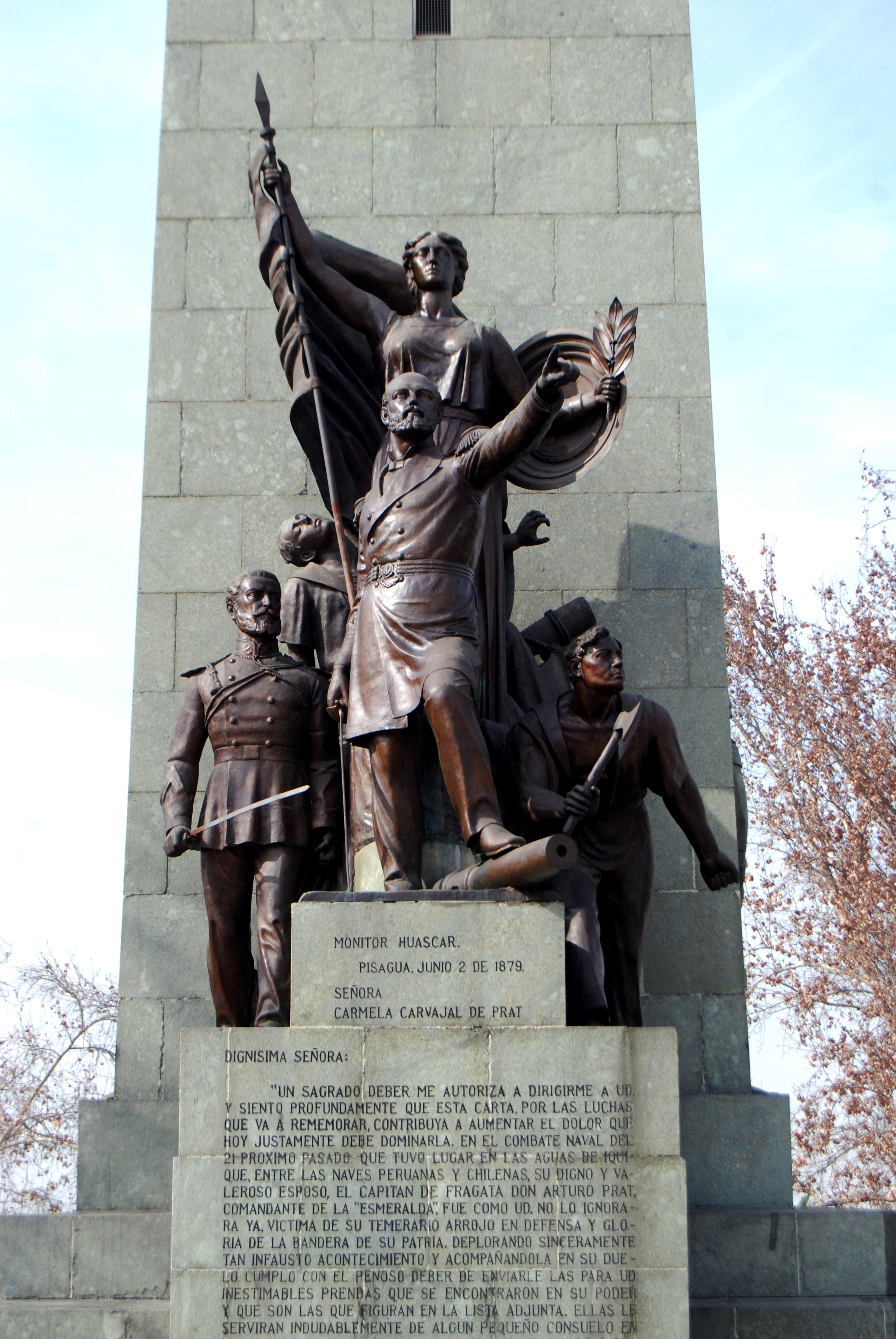 Monumento a Arturo Prat, Santiago de Chile. Escultor José Carocca Laflor, 1962